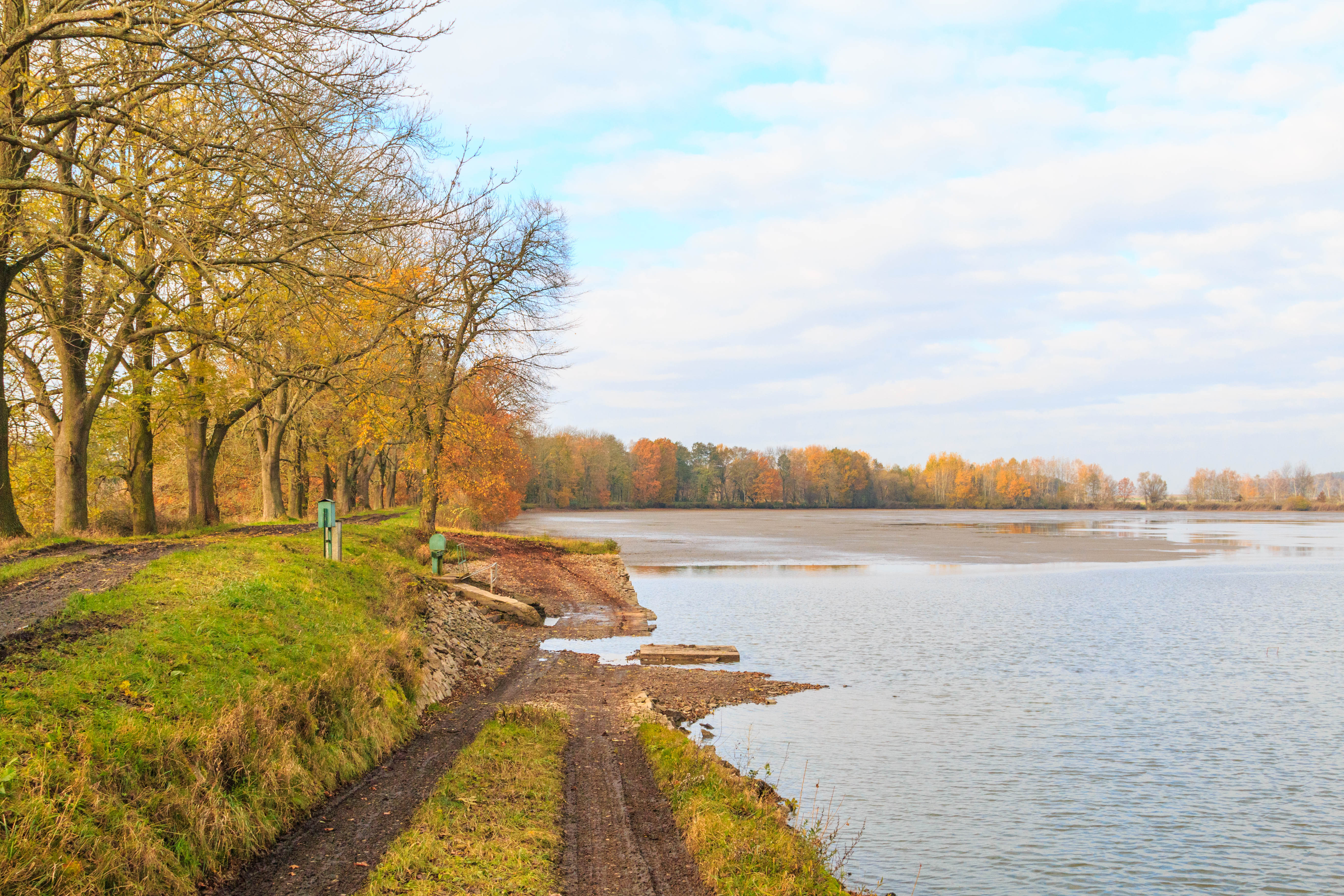 Sopřečský rybník Project: Vodstvo.